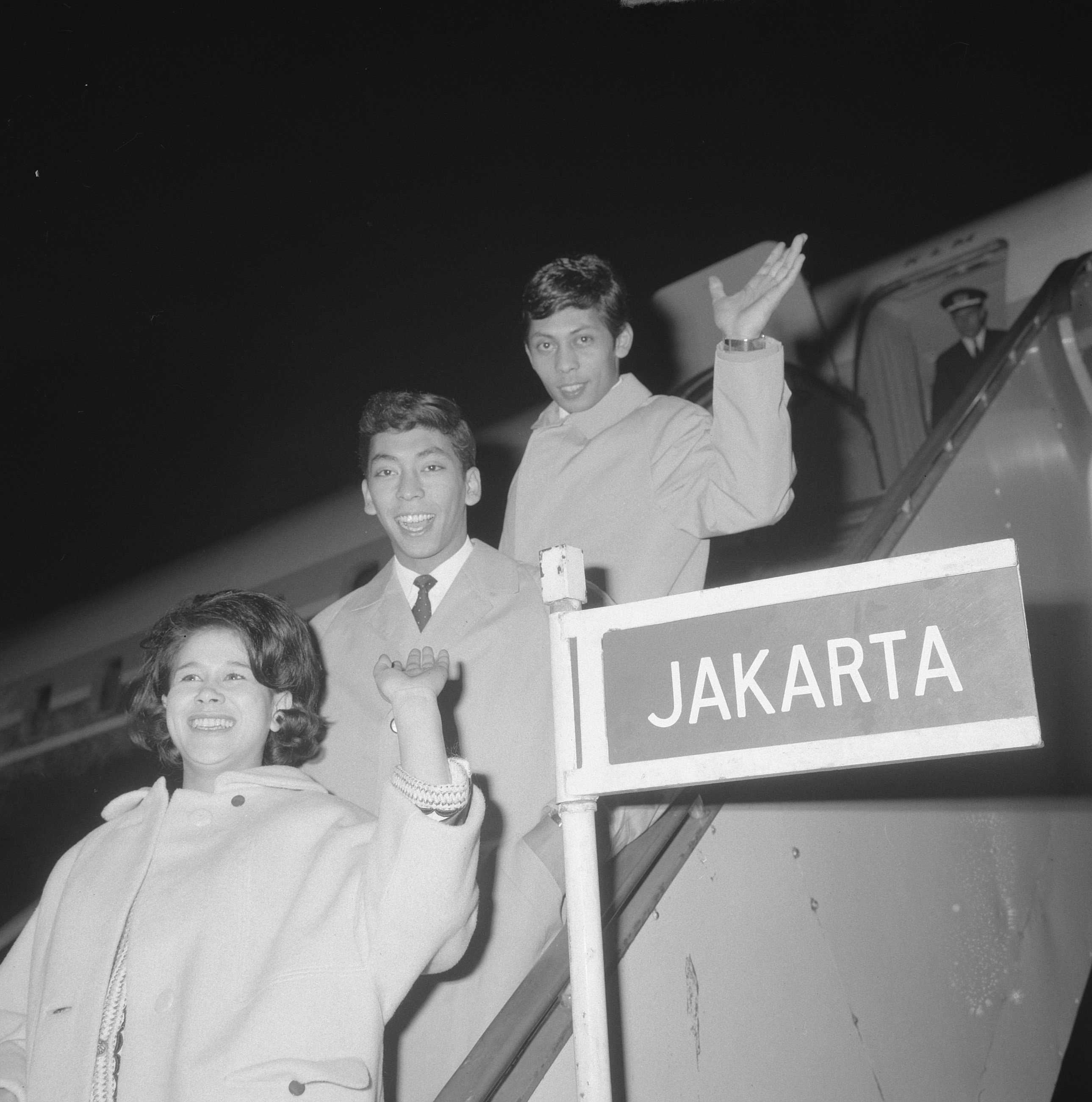 Collectie / Archief : Fotocollectie Anefo Reportage / Serie : [ onbekend ] Beschrijving : The Blue Diamonds en Anneke Gronloh naar Indonesie vertrokken, Anneke Gronloh en The Blue Diamonds bij de kerstboom op Schiphol Datum : 18 december 1964 Locatie : Noord-Holland, Schiphol Trefwoorden : kerstbomen Persoonsnaam : Grönloh, Anneke Instellingsnaam : Blue Diamonds, The Fotograaf : Gelderen, Hugo van / Anefo Auteursrechthebbende : Nationaal Archief Materiaalsoort : Negatief (zwart/wit) Nummer archiefinventaris : bekijk toegang 2.24.01.03 Bestanddeelnummer : 917-2580